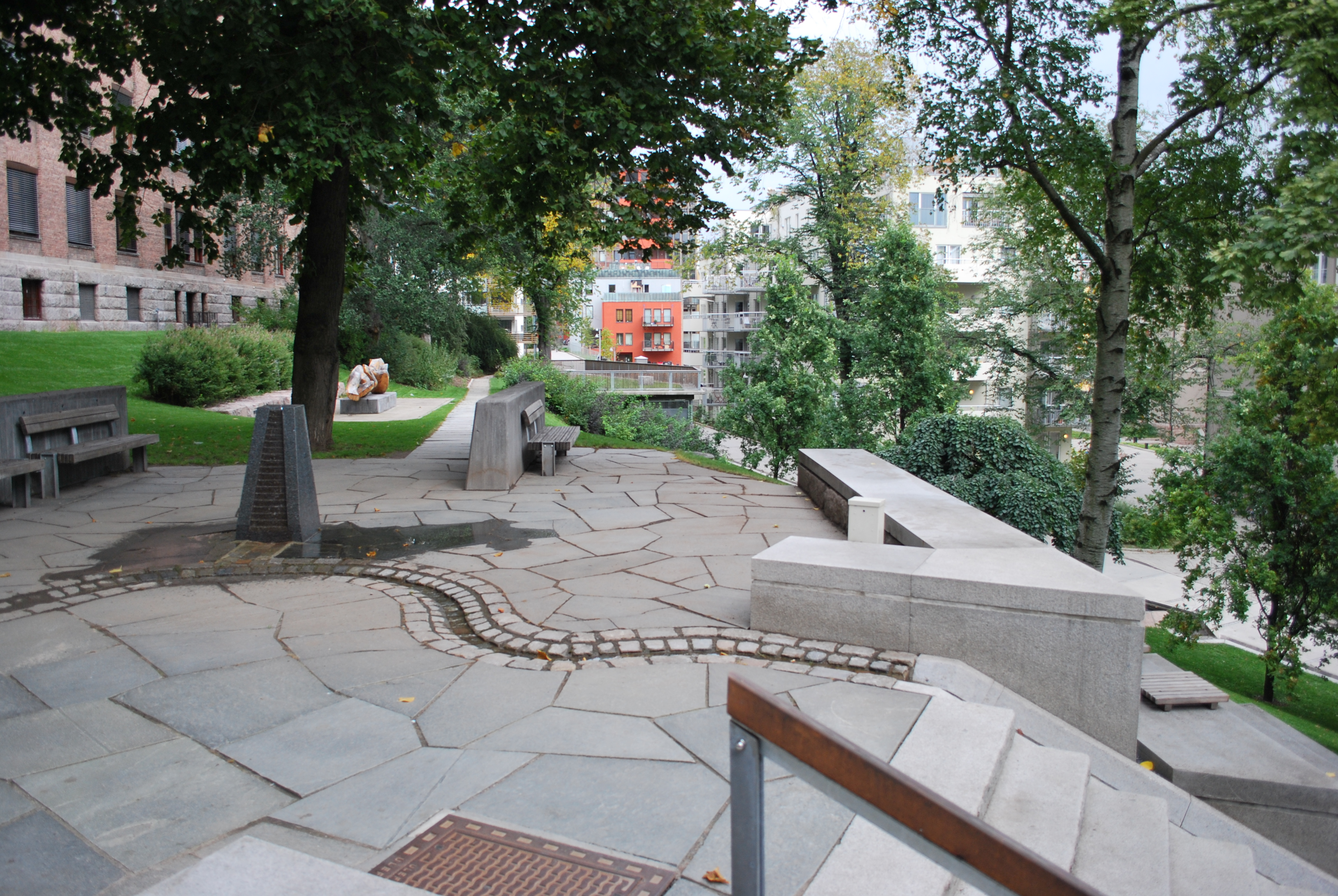 Kvinneklinikkparken, med drikkefontene, treskulptur (kastanje) og vannløp